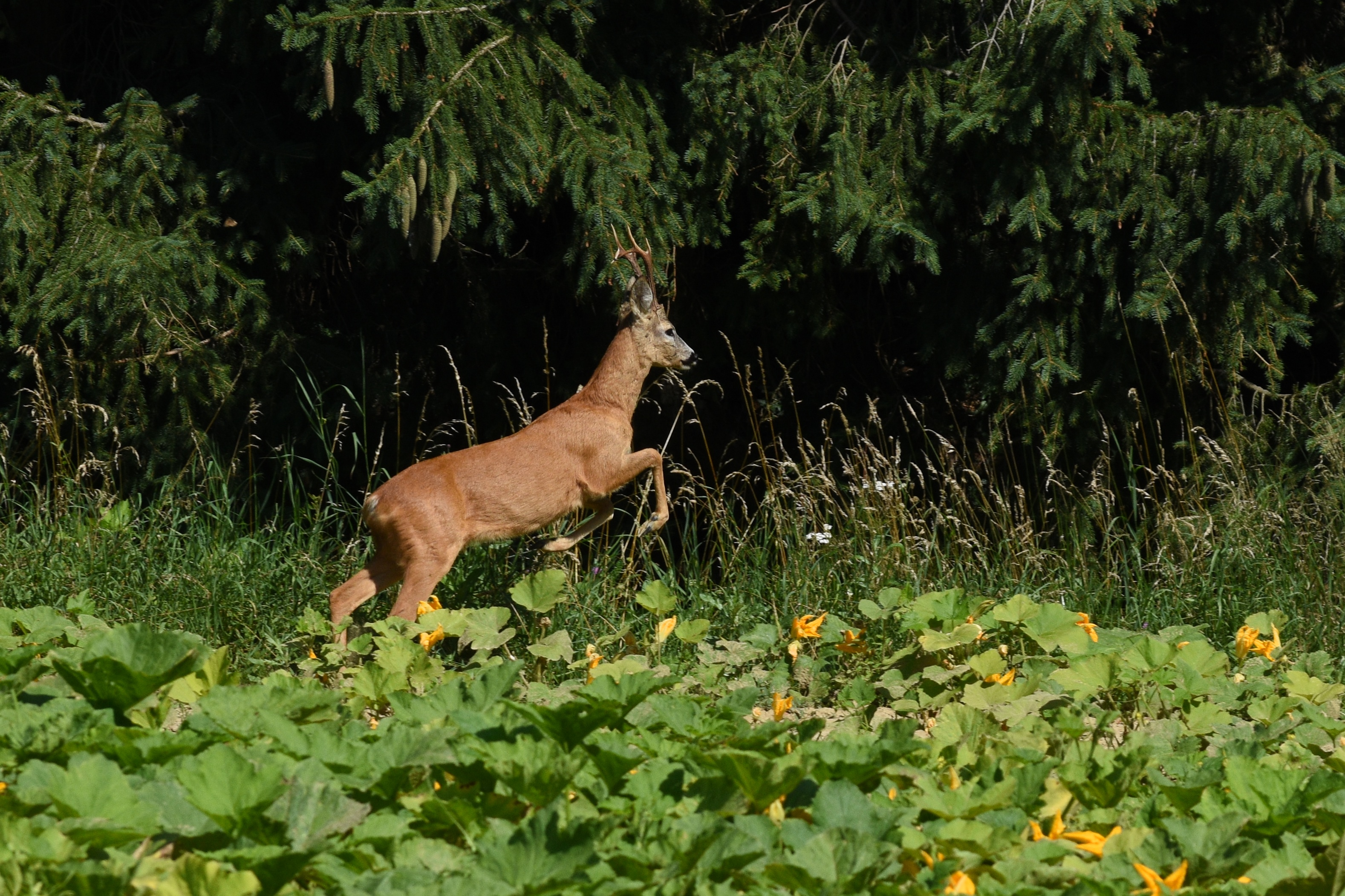 Capreolus capreolus in Styria